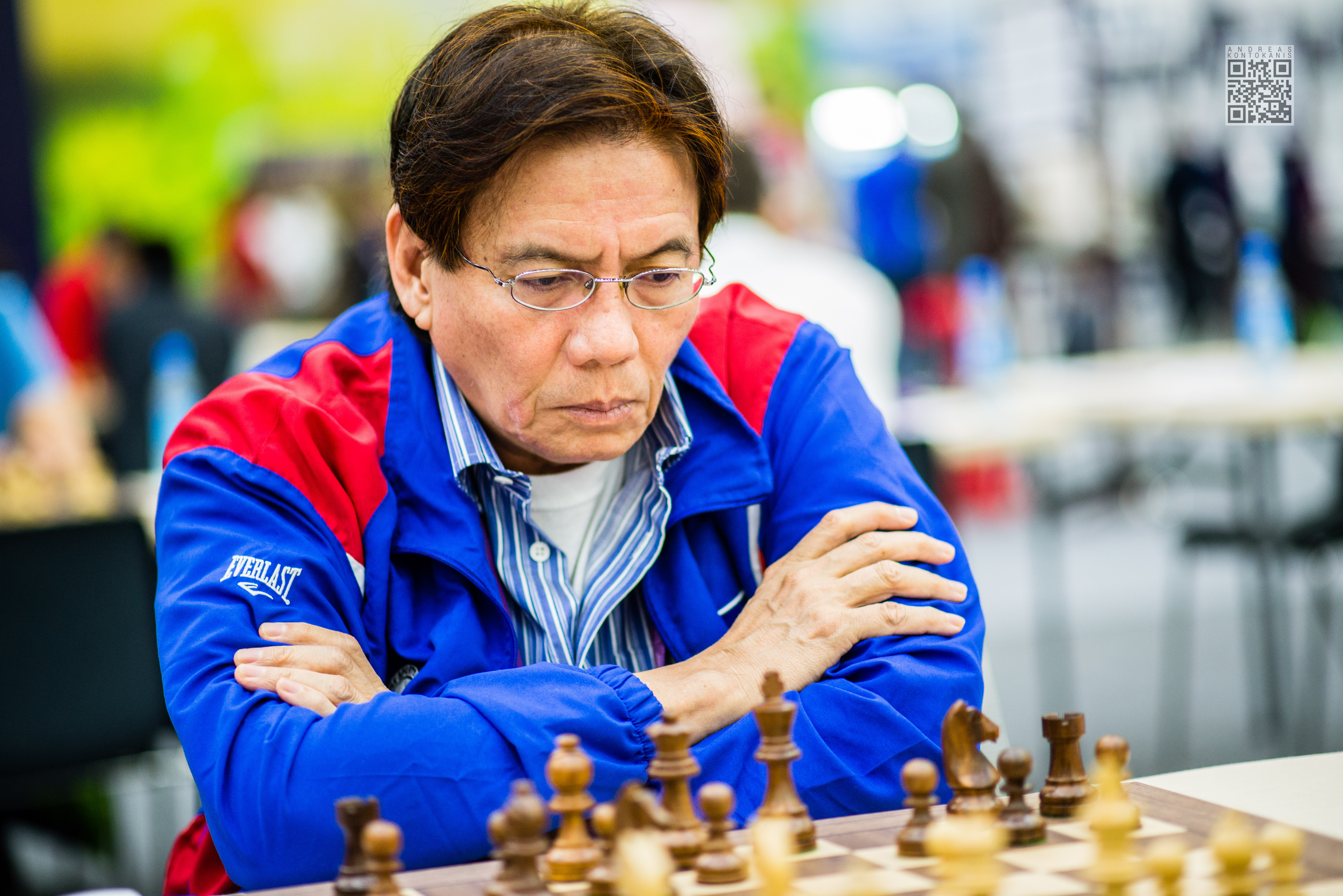 Torre Eugenio